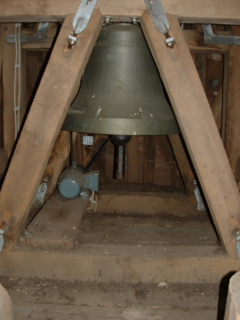 Evangelische Kirche Bruchweiler, Glocke